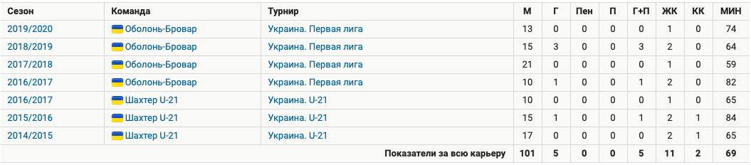 футбол